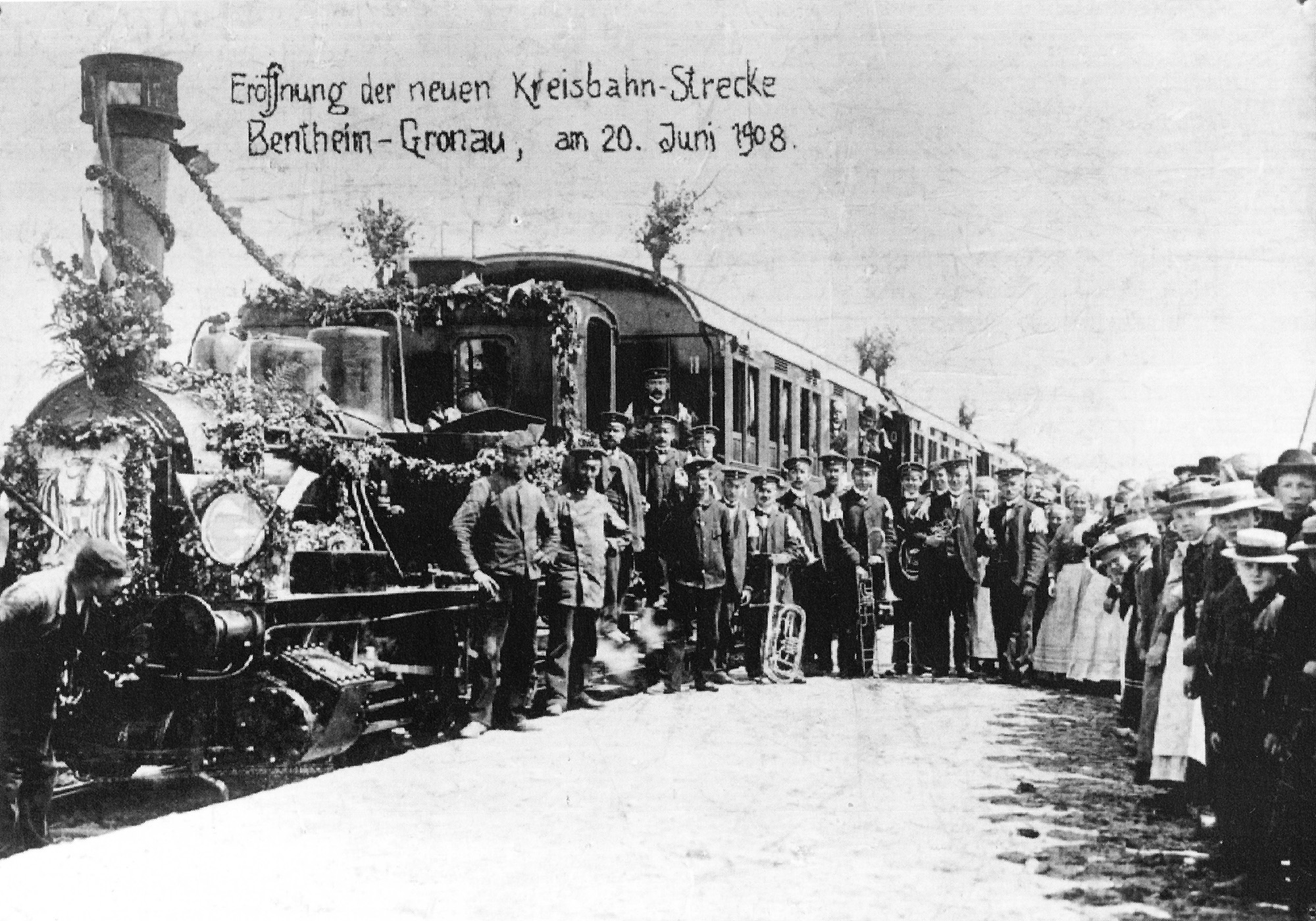 Dampflok "Fürst zu Bentheim" am 20.06.1908 als Eröffnungszug bei der Eröffnung der Strecke von Bentheim nach Gronau. Die Aufnahme entstand in Gildehaus um circa 12:20 Uhr.